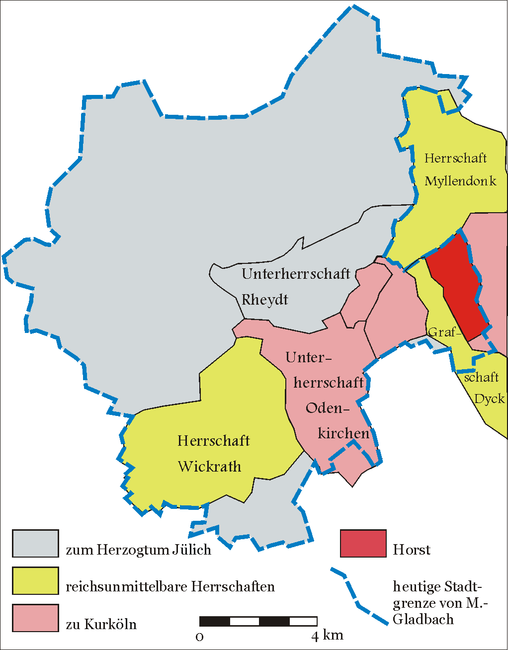 Karte der territorialen Verhältnisse auf dem heutigen Stadtgebiet von Mönchengladbach um 1720